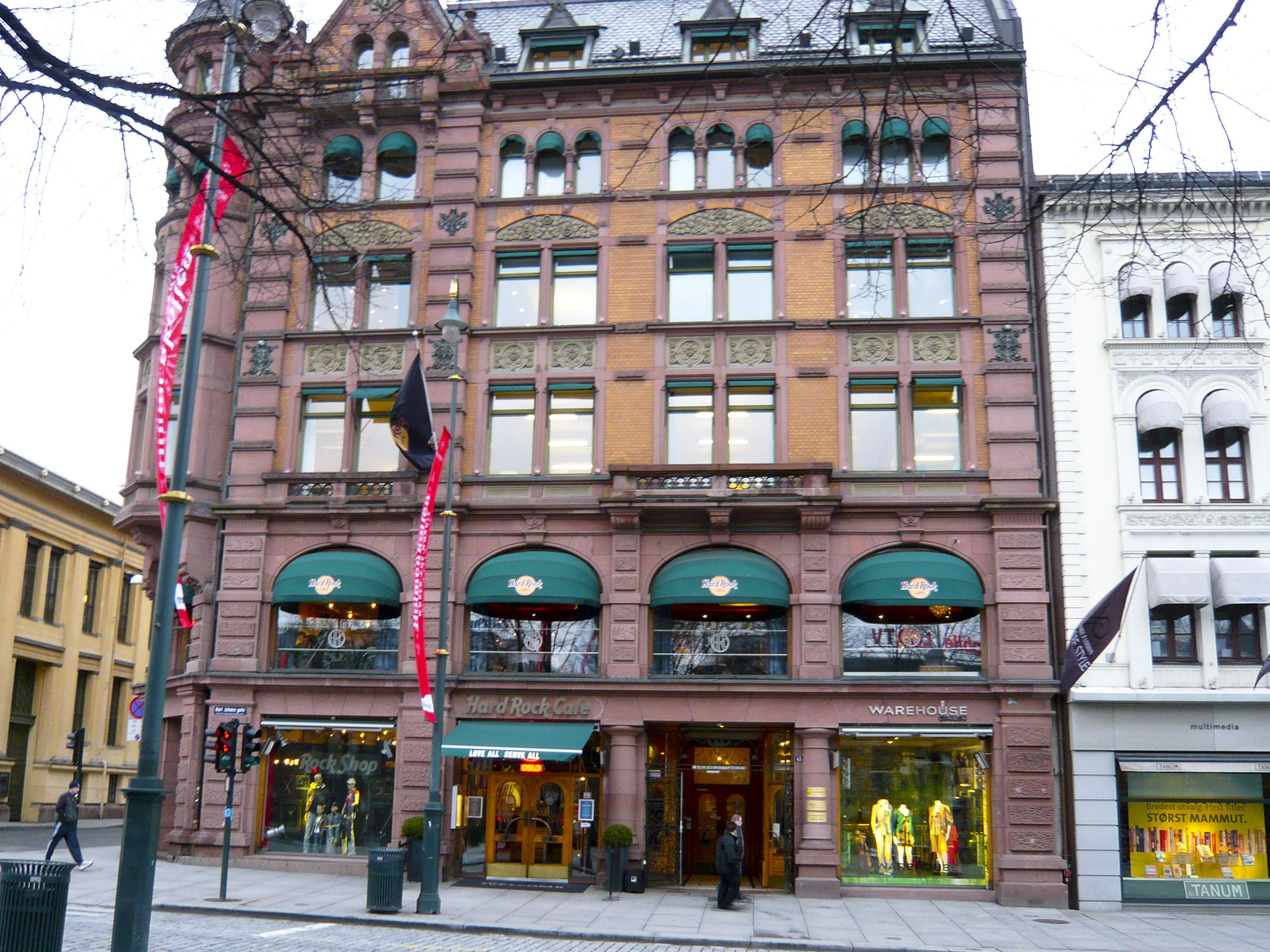 Karl Johans gate 45, huser Hard Rock Café